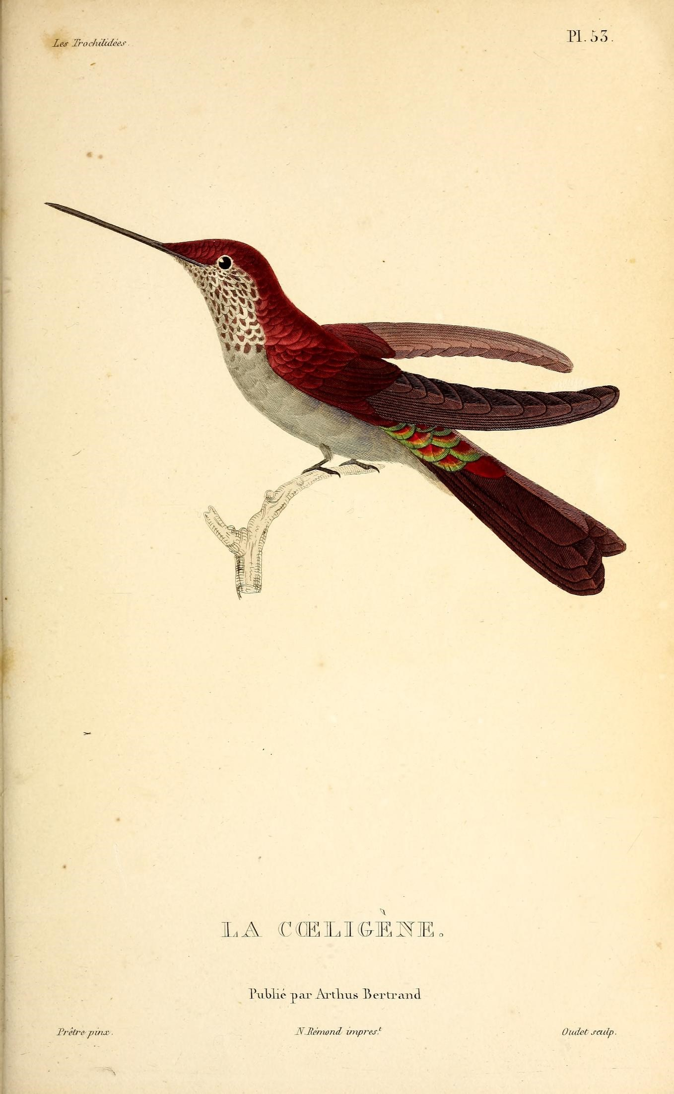 Les trochilidées :. Paris :A. Bertrand,[1832?].